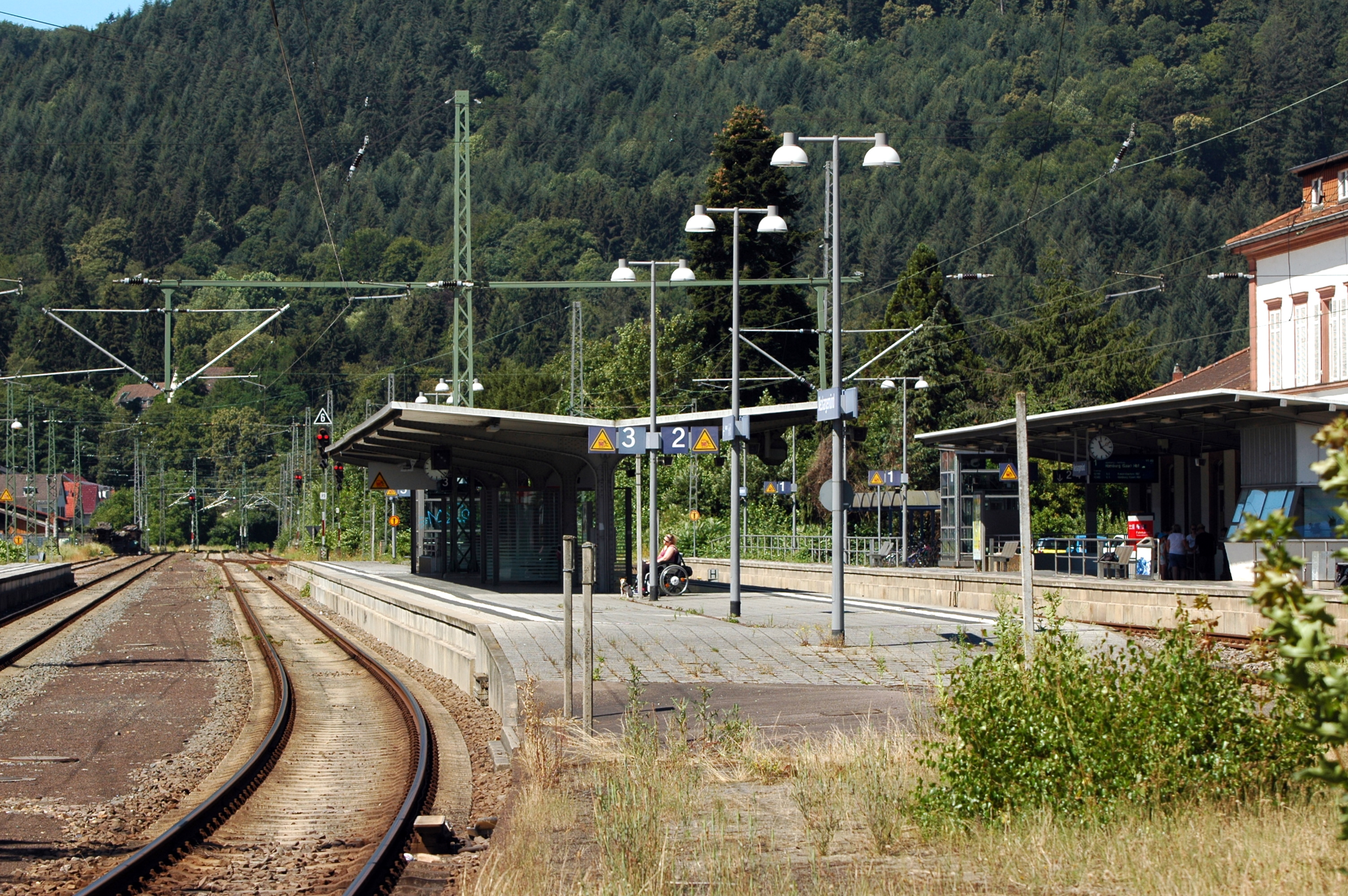 Neckargemünd - Bahnhof